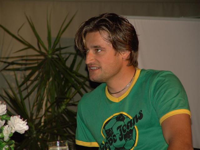 Gerhard Schoenfelder bei einer Veranstaltung